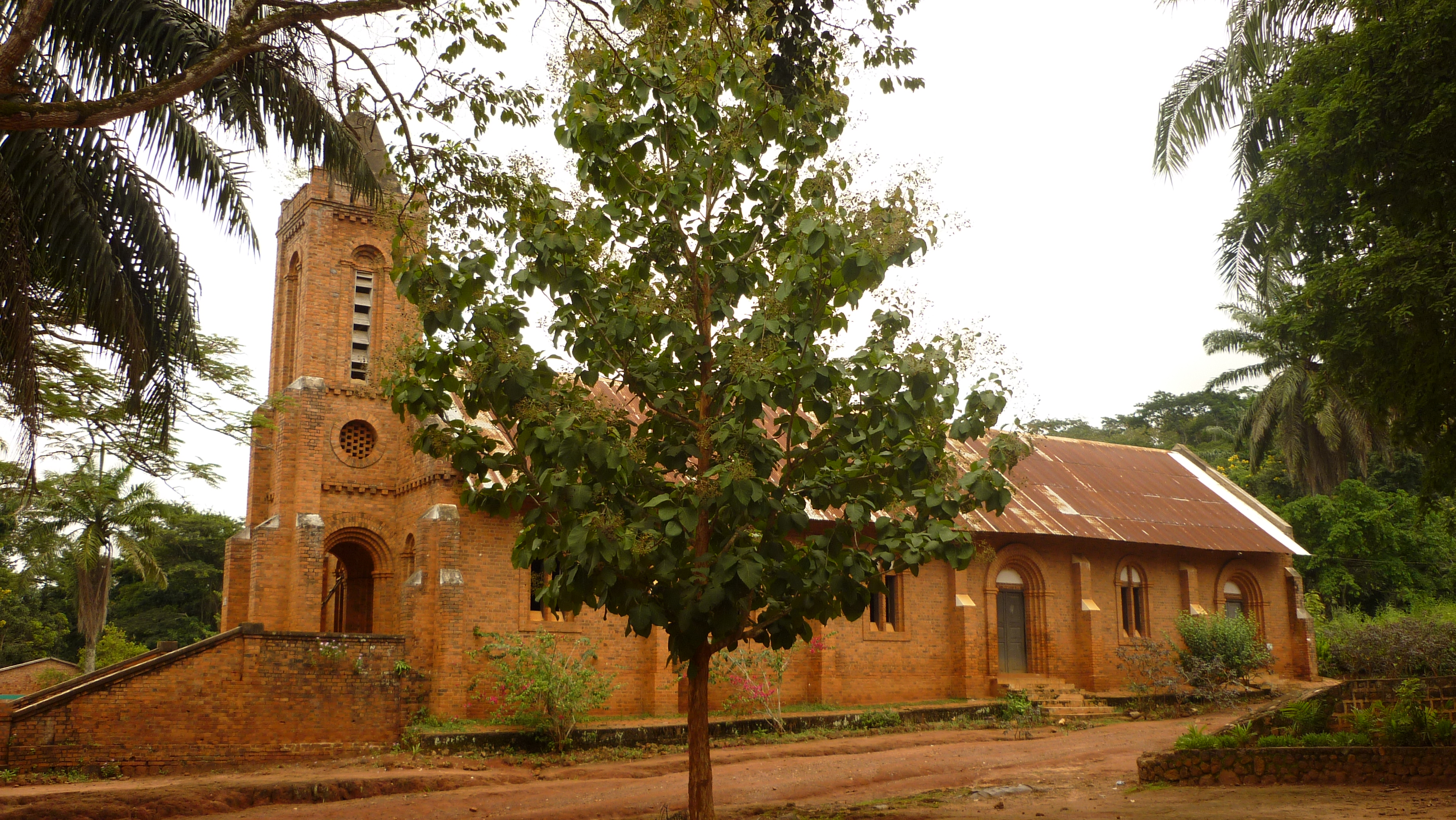 Parroquia St. Georges (Ouango, República Centroafricana)